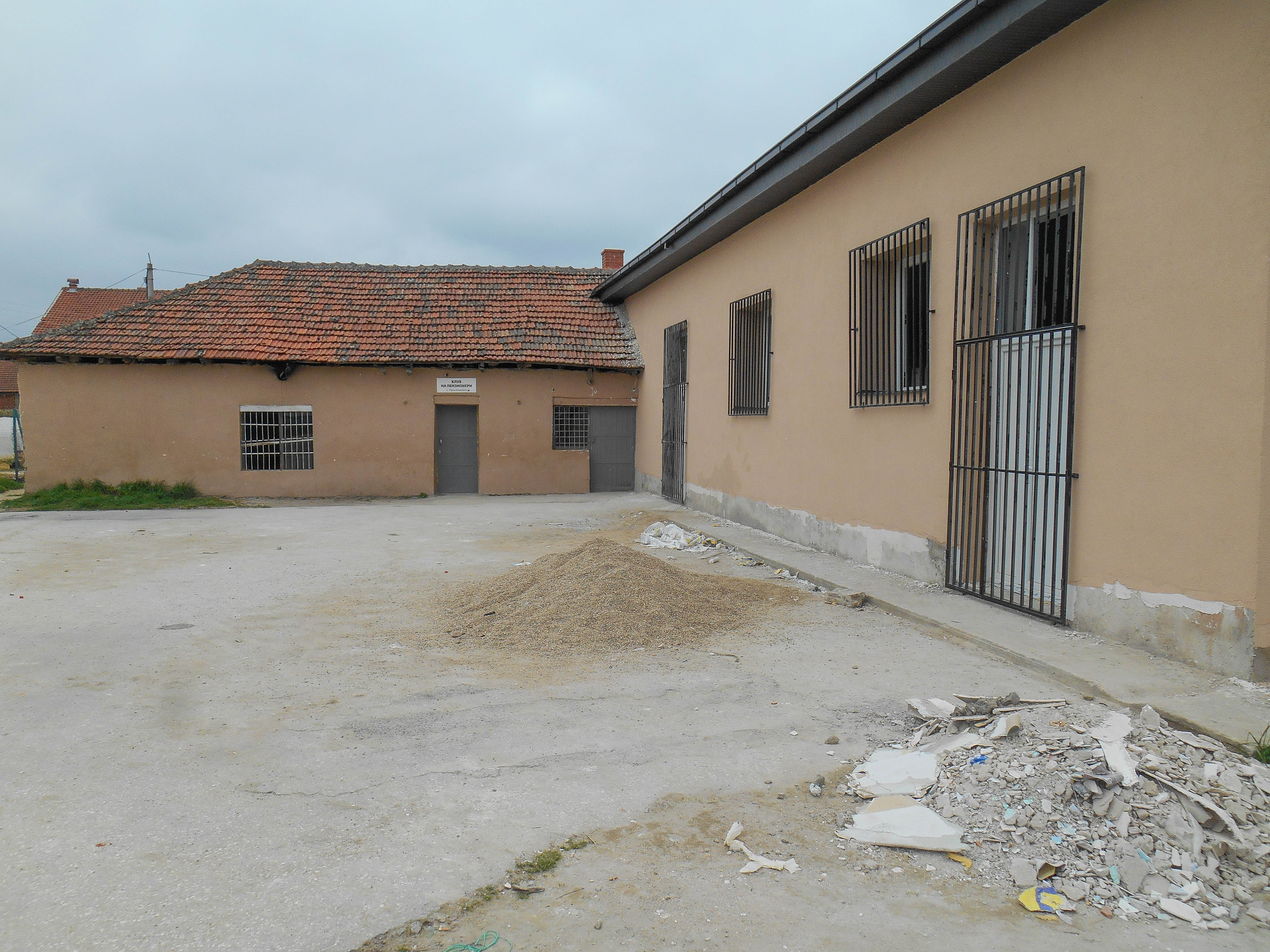 Клуб на пензионери